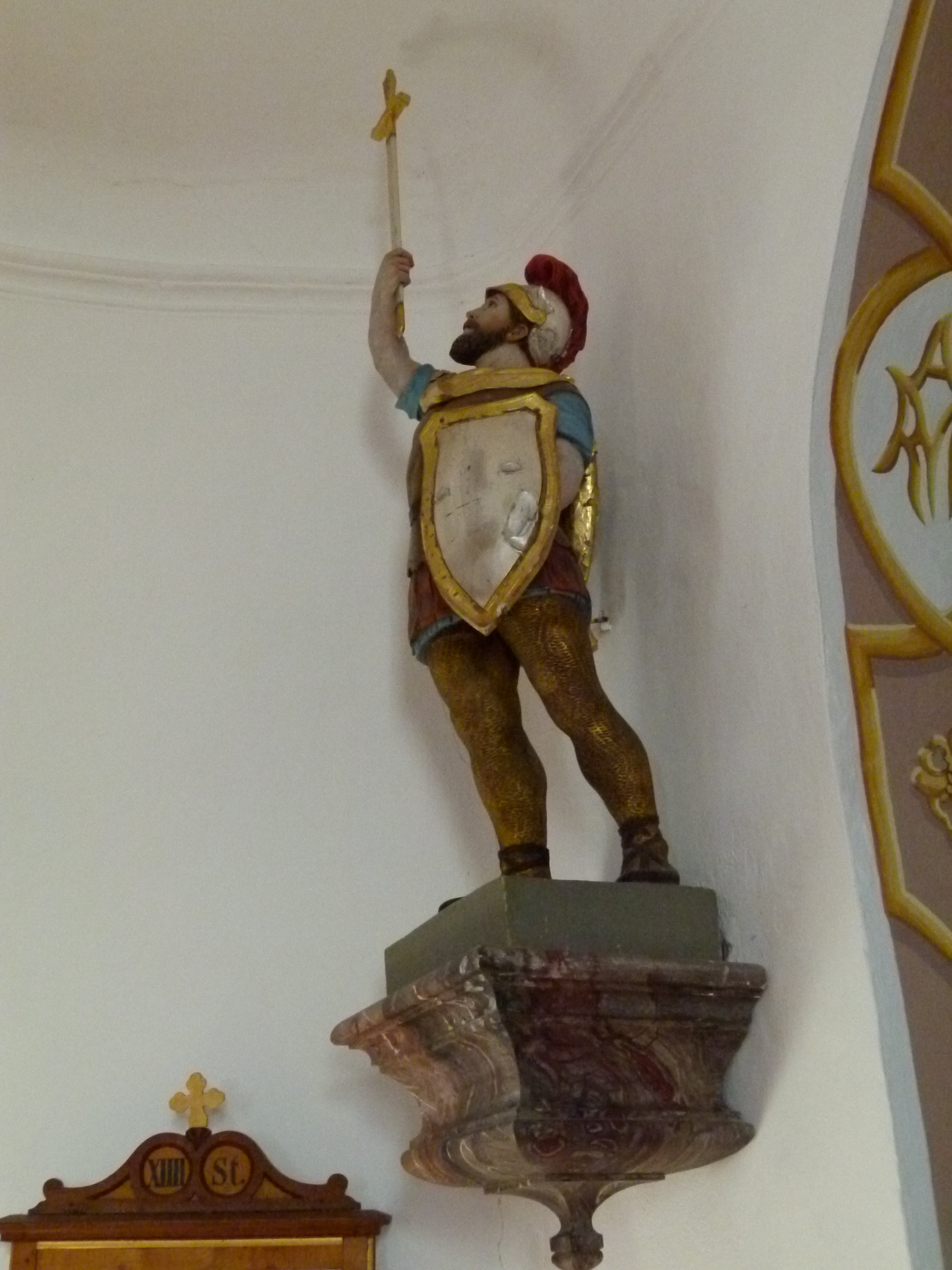 Figur des Hl. Rasso in der Kapelle in Schweinegg Gde. Eisenberg